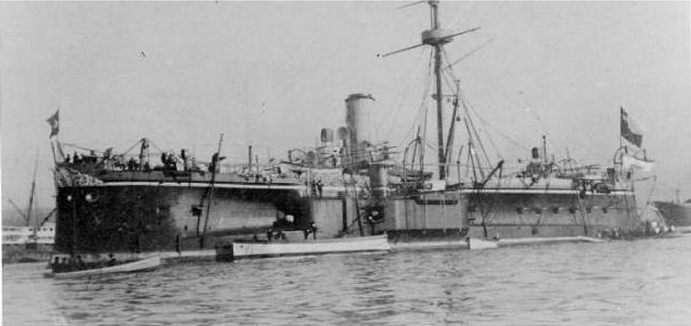 Blanco Encalada (ship, 1875)